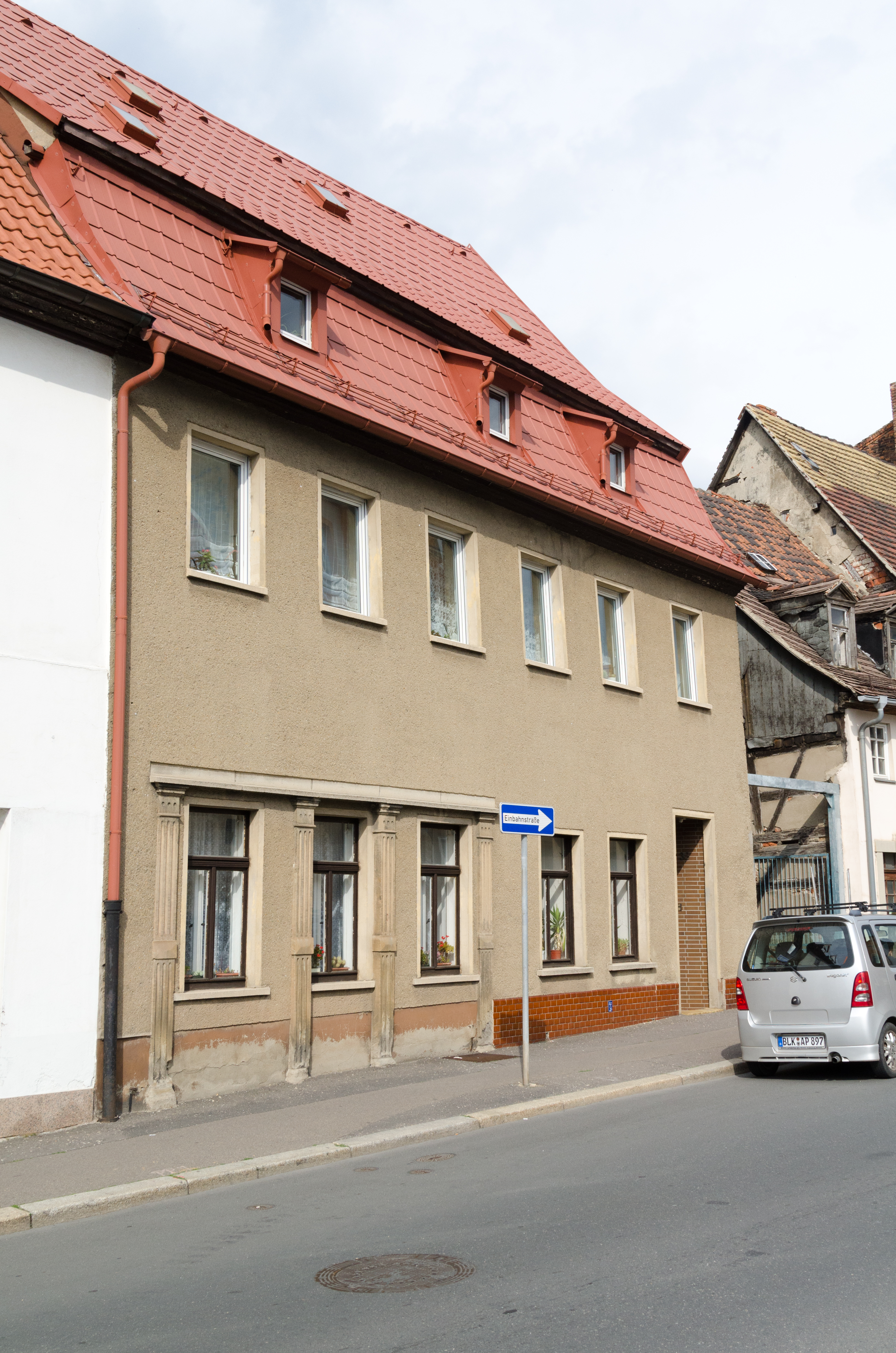 Zeitz, Kalkstraße 38